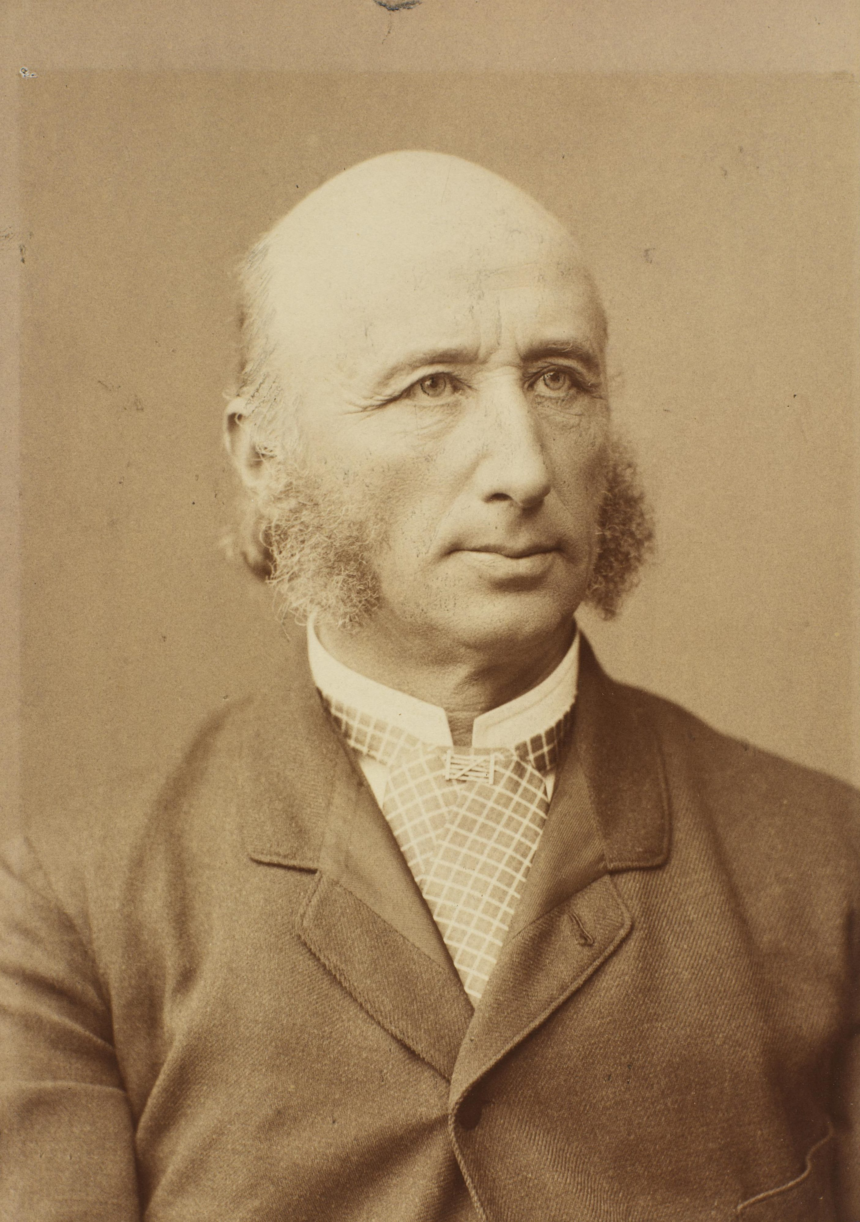 Bildet er hentet fra Nasjonalbibliotekets bildesamling Depicted person: Heftye, Thomas Johannessen